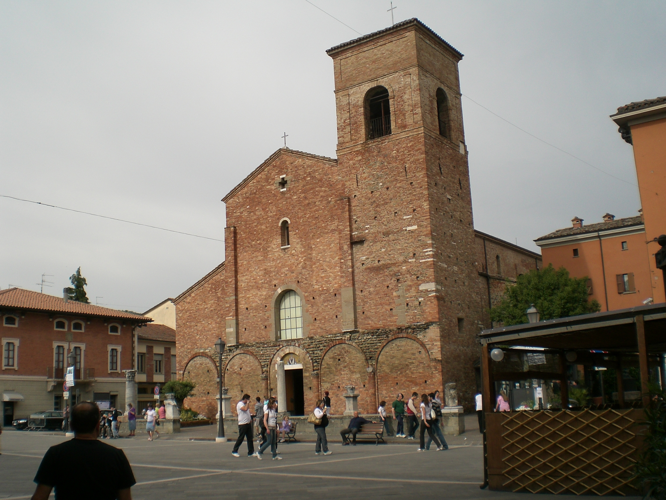 Sarsina (provincia di Forlì-Cesena), cattedrale di San Vicinio